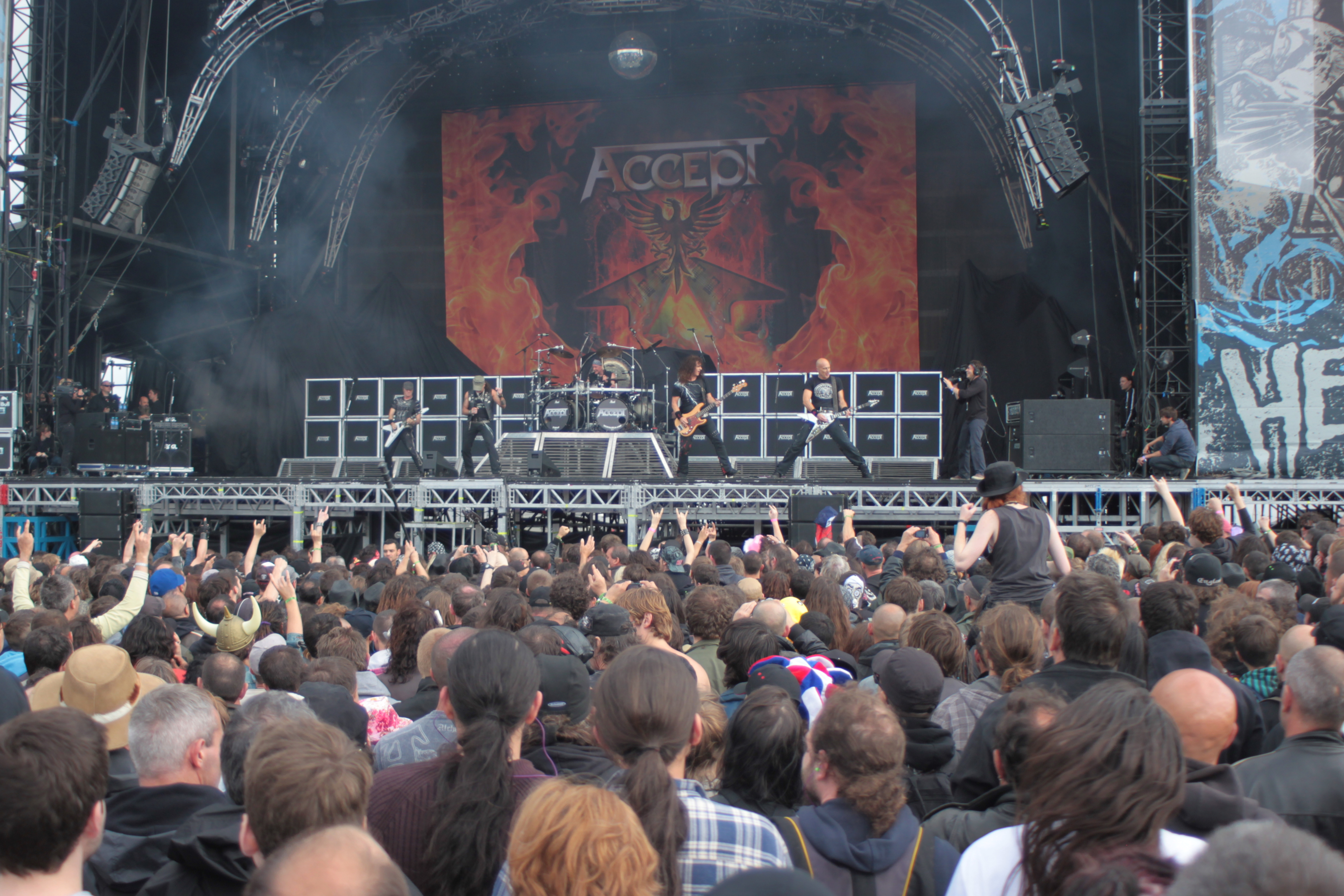 Accept, Helfest 2013, Fr-44-Clisson.